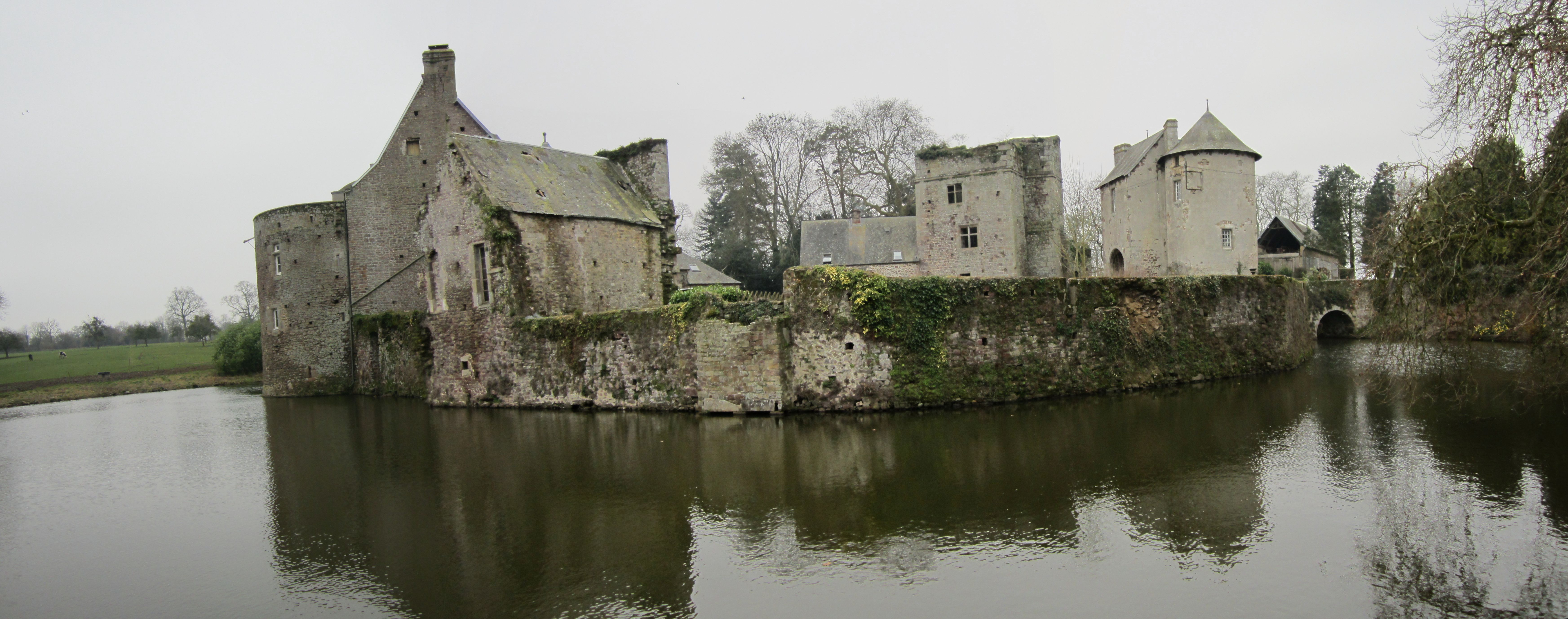 Château de Chanteloup (XIVe - XVIe) .